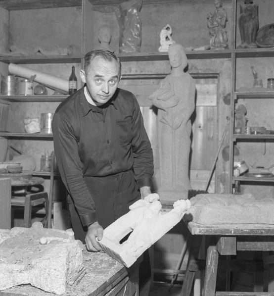 Cor Goorts in 1959